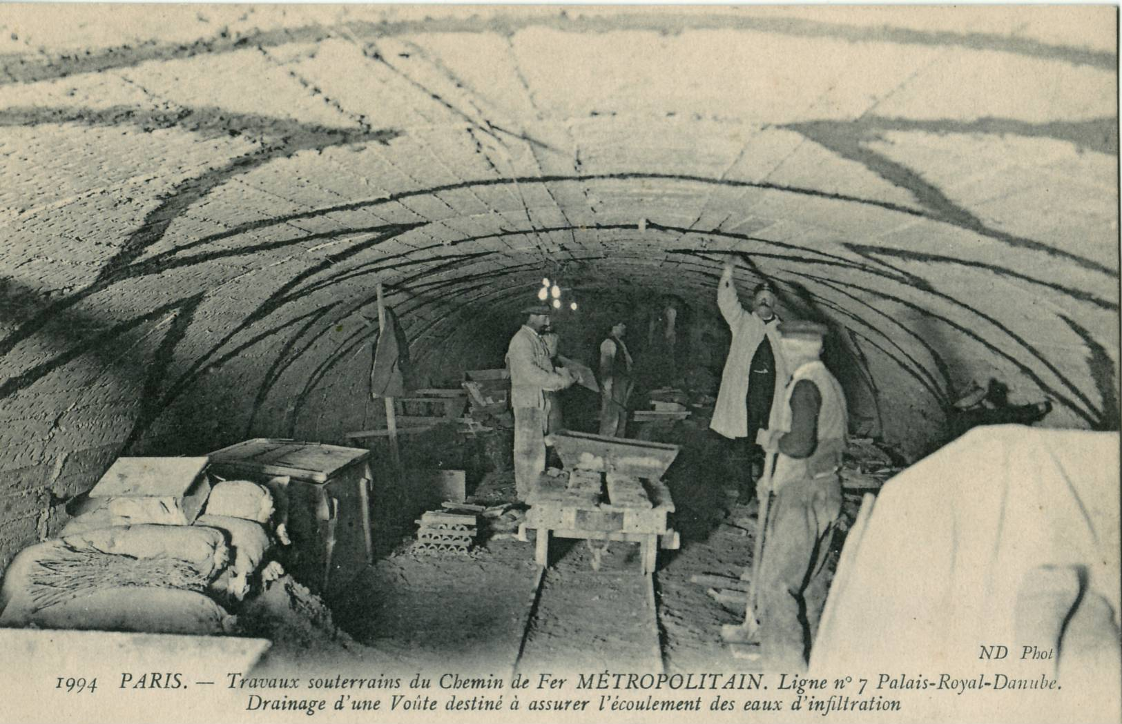 Carte postale ancienne éditée par ND, n°1994 :PARIS - Travaux souterrains du Chemin de fer METROPOLITAIN. Ligne n°7 Palais-Royal - Danube. Drainage d'une Voûte destiné à assurer l'écoulement des eaux d'infiltration.